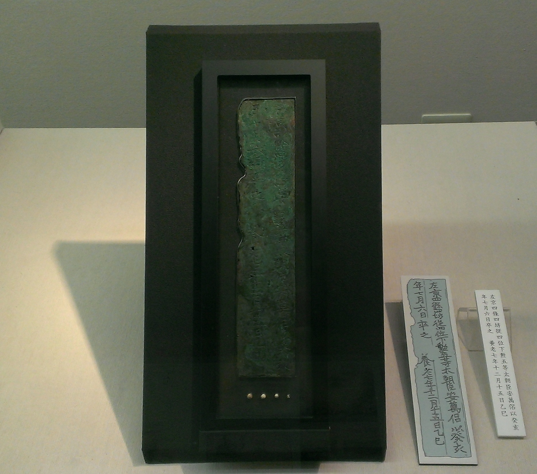 奈良県奈良市此瀬町の太安万侶墓から出土した墓誌と真珠。墓誌は青銅製、共に重要文化財、文化庁蔵、奈良県立橿原考古学研究所附属博物館展示。